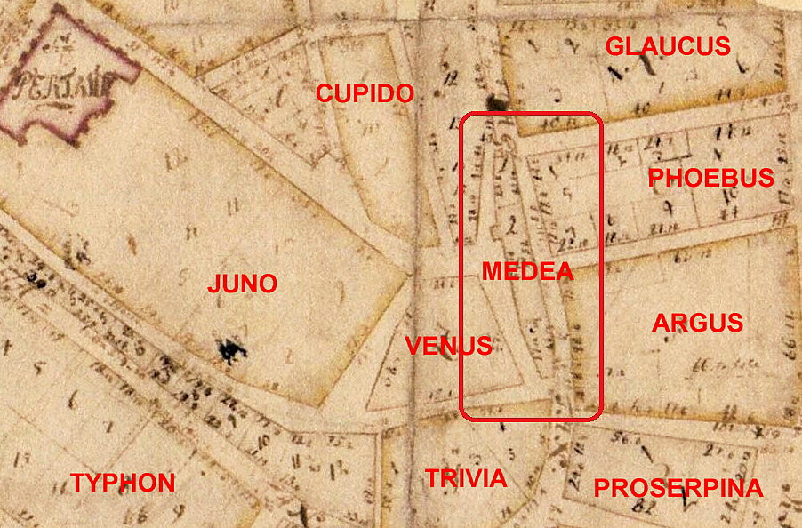 Del av "Grundritning och Charta Stockholm Stad" visande kvarteret Medea